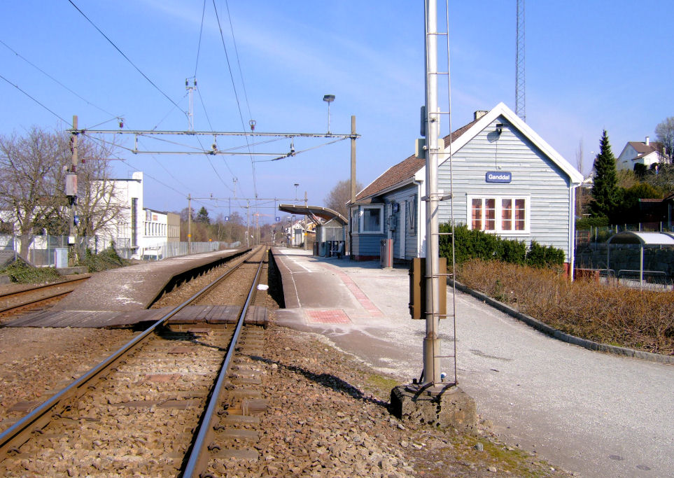 Ganddal_stasjon , Sandnes, Rogaland Norway